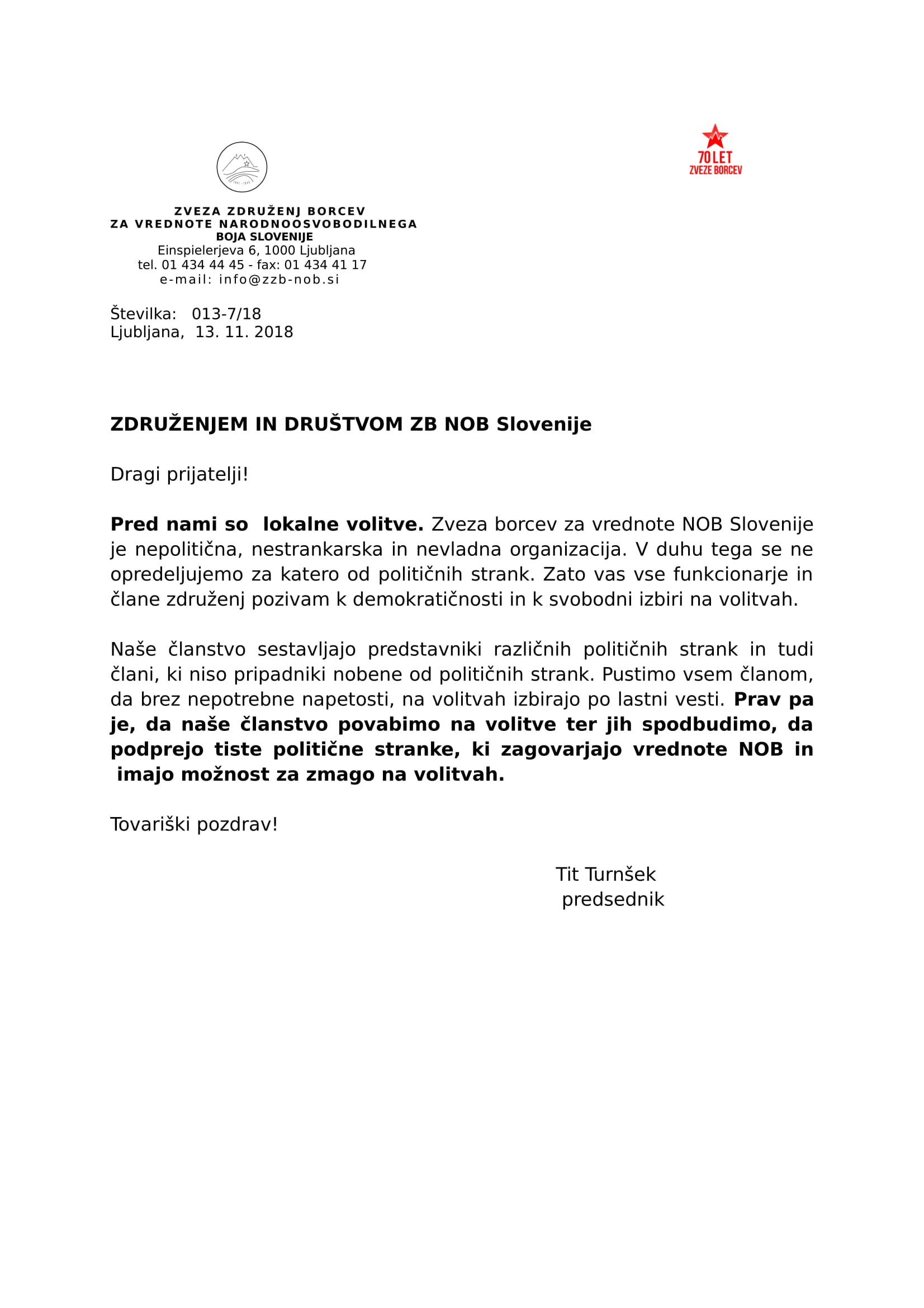 Pismo predsednika ZZB NOB združenjem Vsebina: ZVEZA ZDRUŽENJ BORCEV ZA VREDNOTE NARODNOOSVOBODILNEGA BOJA SLOVENIJE Einspielerjeva 6, 1000 Ljubljana tel. 01 434 44 45 - fax: 01 434 41 17 Številka: 013-7/18 Ljubljana, 13. 11. 2018 ZDRUŽENJEM IN DRUŠTVOM ZB NOB Slovenije Dragi prijatelji! Pred nami so lokalne volitve. Zveza borcev za vrednote NOB Slovenije je nepolitična, nestrankarska in nevladna organizacija. V duhu tega se ne opredeljujemo za katero od političnih strank. Zato vas vse funkcionarje in člane združenj pozivam k demokratičnosti in k svobodni izbiri na volitvah. Naše članstvo sestavljajo predstavniki različnih političnih strank in tudi člani, ki niso pripadniki nobene od političnih strank. Pustimo vsem članom, da brez nepotrebne napetosti, na volitvah izbirajo po lastni vesti. Prav pa je, da naše članstvo povabimo na volitve ter jih spodbudimo, da podprejo tiste politične stranke, ki zagovarjajo vrednote NOB in imajo možnost za zmago na volitvah. Tovariški pozdrav! Tit Turnšek predsednik